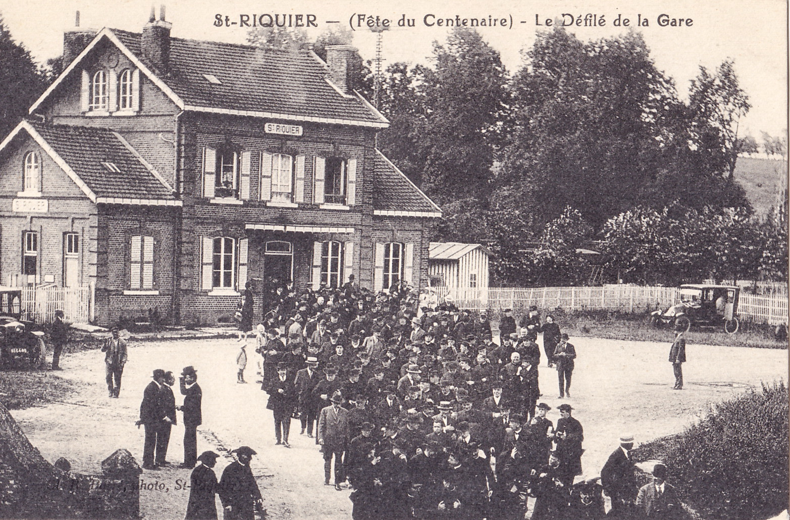 Carte postale ancienne éditée par R. Bard à Saint-Riquier : ST-RIQUIER - (Fete du Centenaire) - Le défilé de la Gare